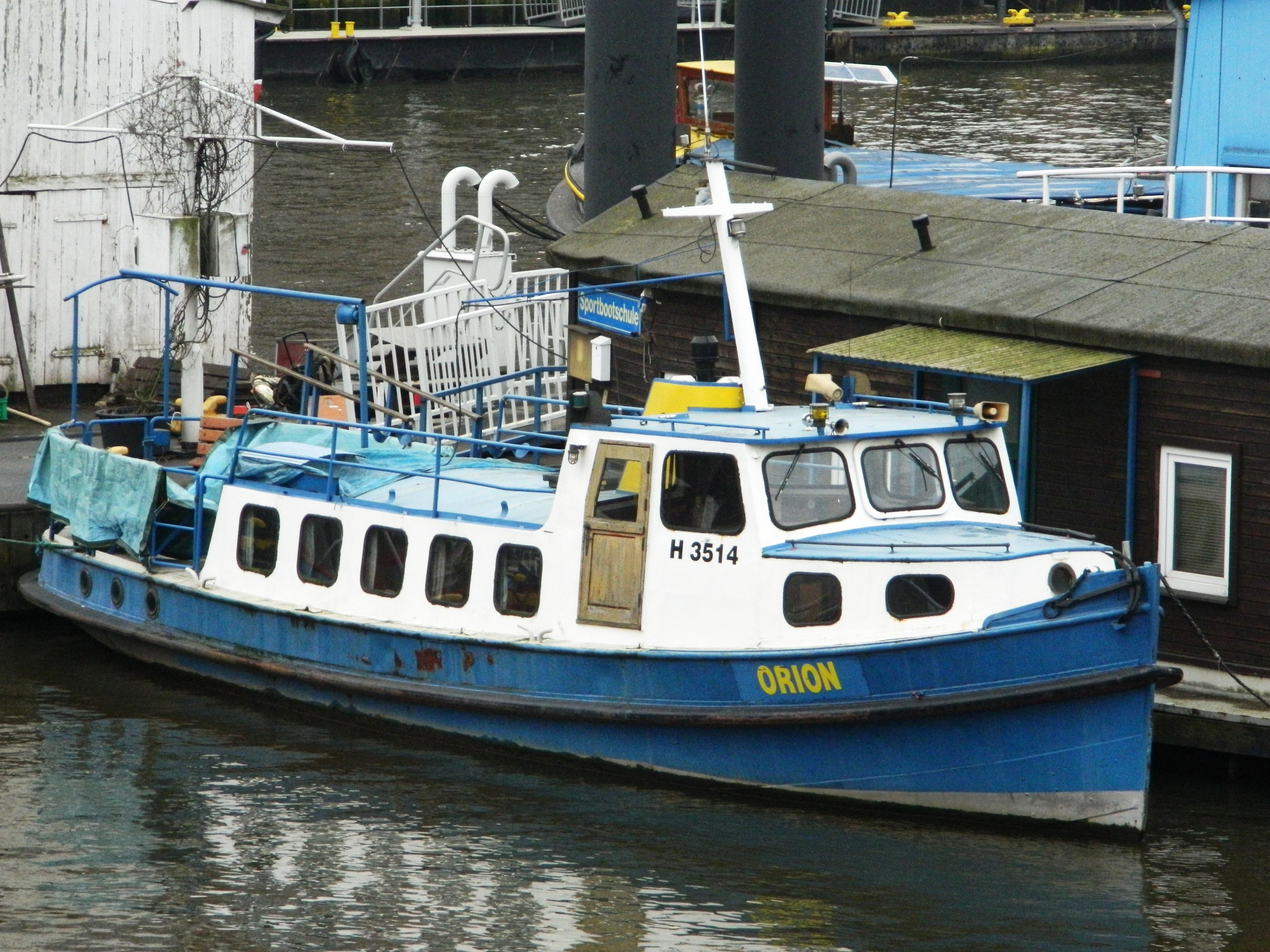 Orion